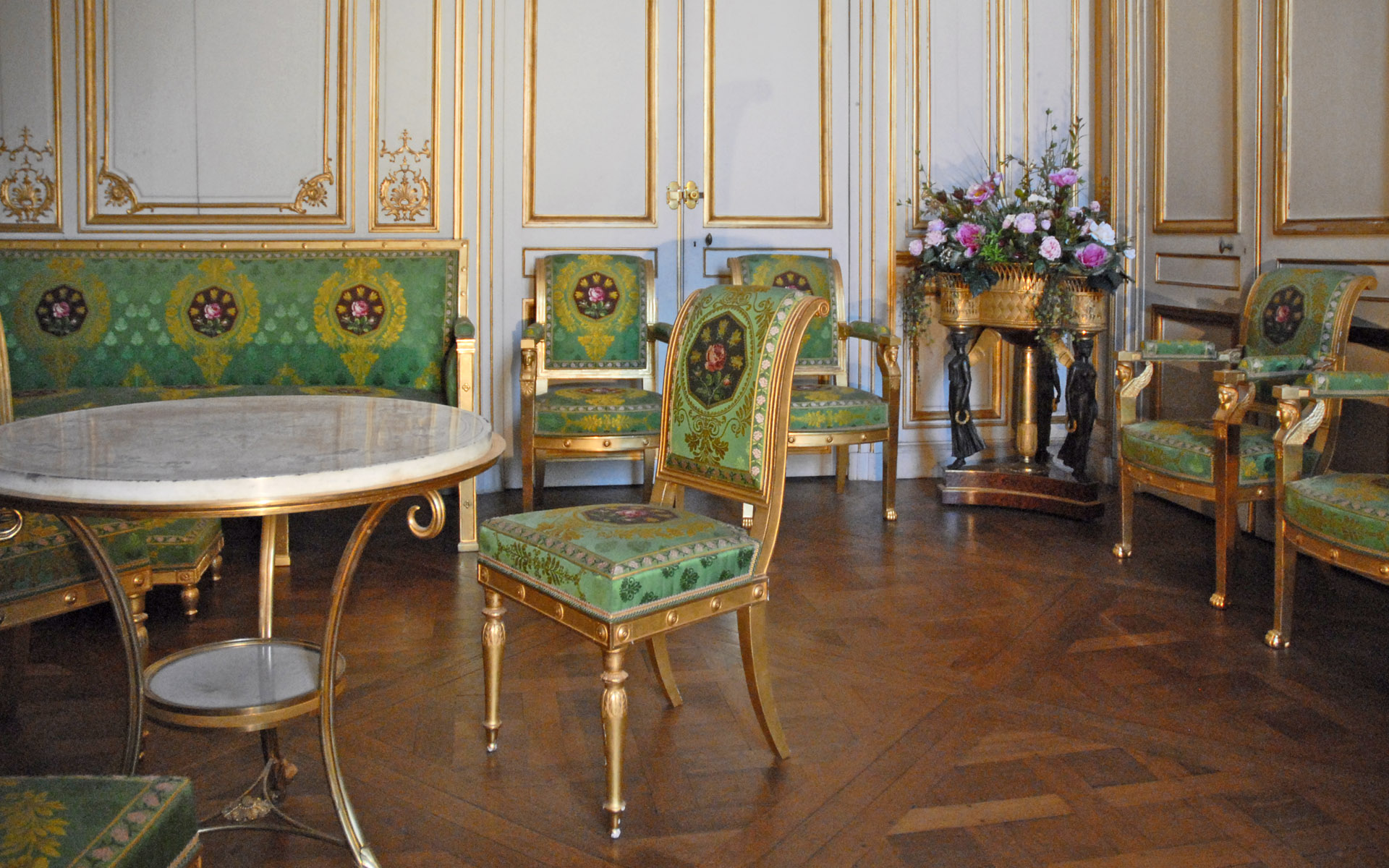 Salon blanc, château de Fontainebleau, France. Mobilier d'époque Empire dans ce salon réservé aux dames de l'Impératrice Eugénie. Canapé à dossier droit et à joues, fauteuils et chaises à dossiers en crosse, le tout garni d'une étoffe verte; guéridon et jardinière (porte-plantes). Le château de Fontainebleau offre le souvenir de plus de 700 ans de présence des souverains de France, de l’intronisation de Louis VII en 1137 à la chute du Second Empire en 1870.